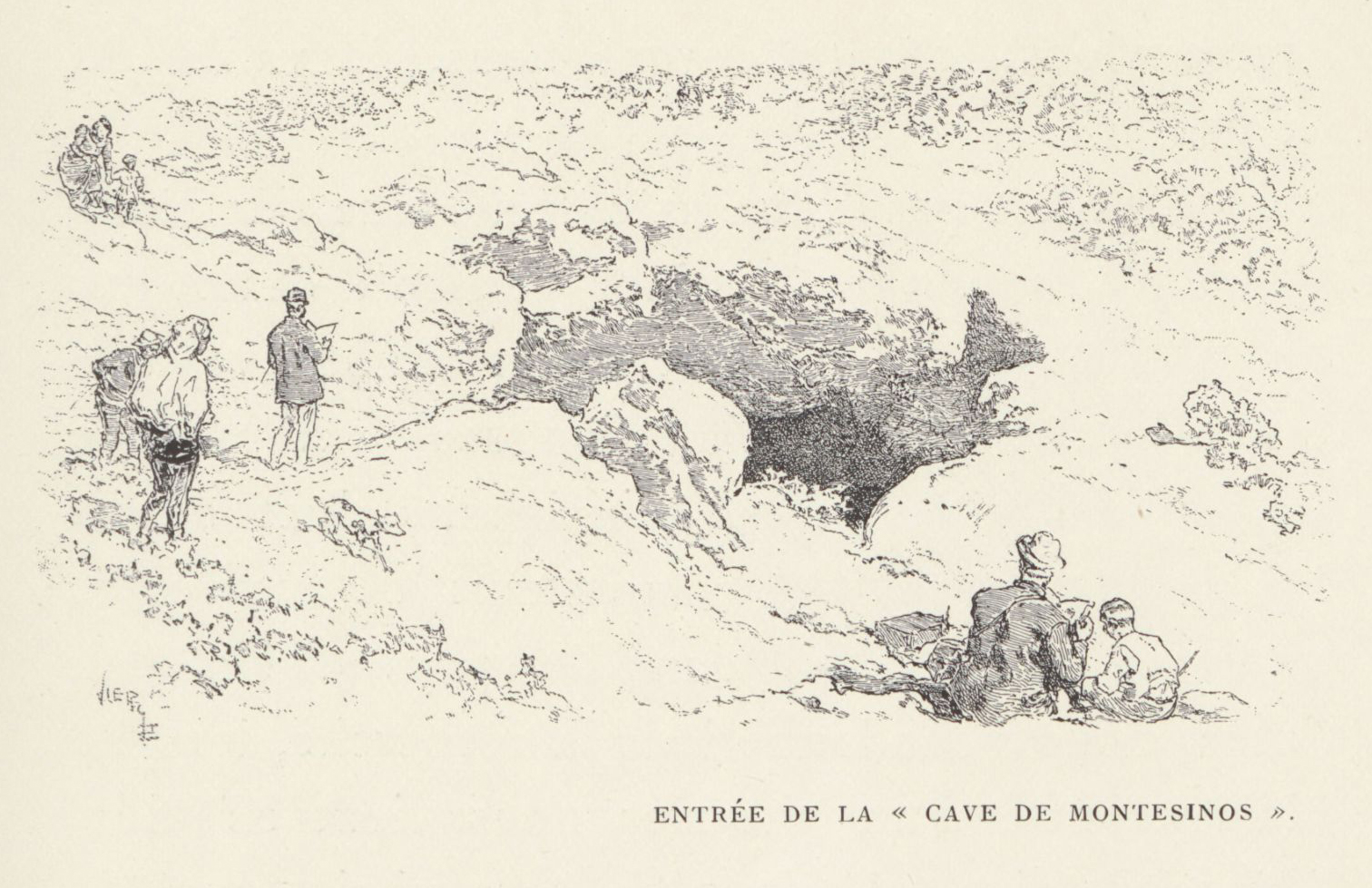 Entrée de la «cave de Montesinos».